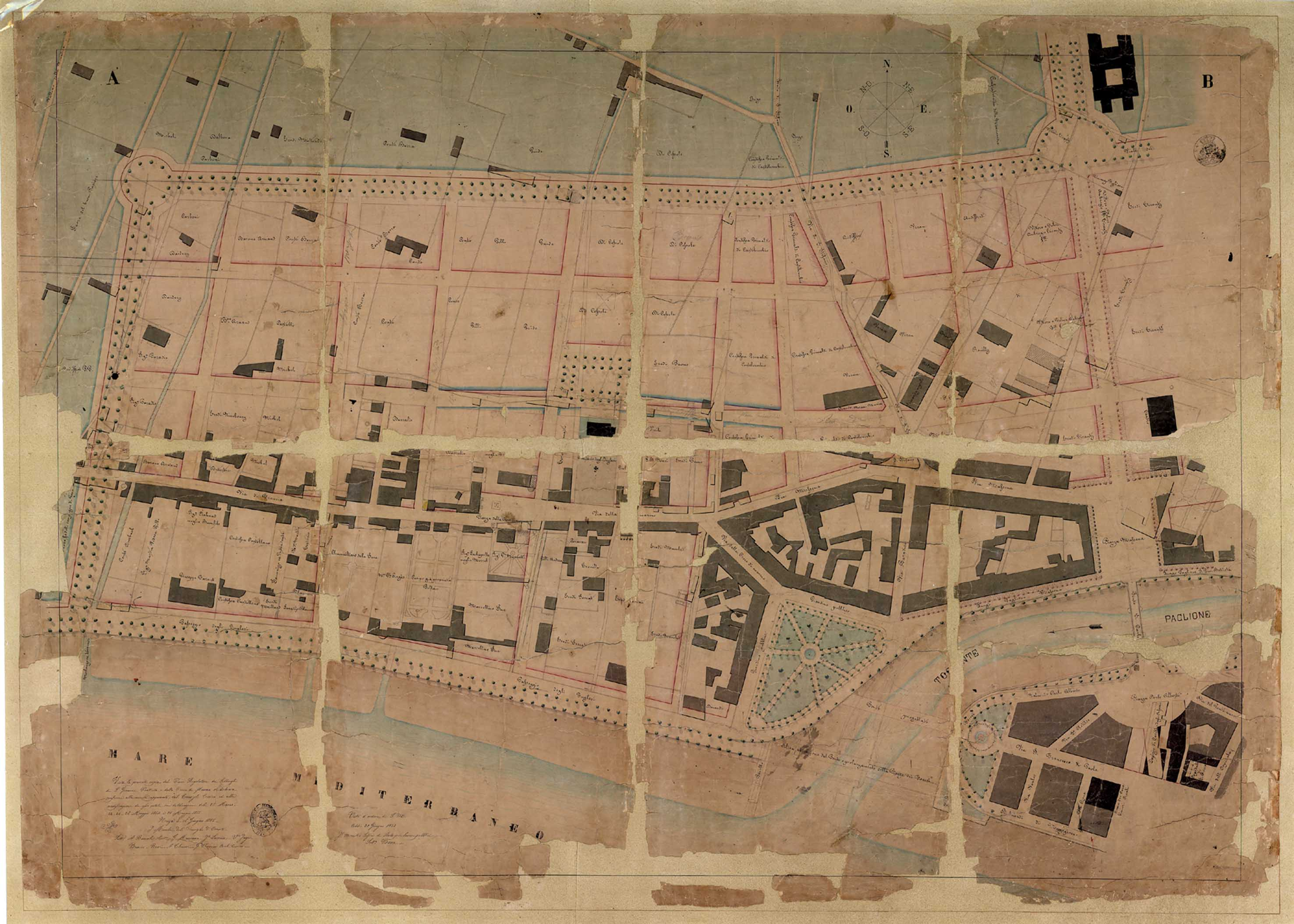 Plan régulateur du quartier Croix de Marbre approuvé par le Consiglio d'Ornato en 1854.